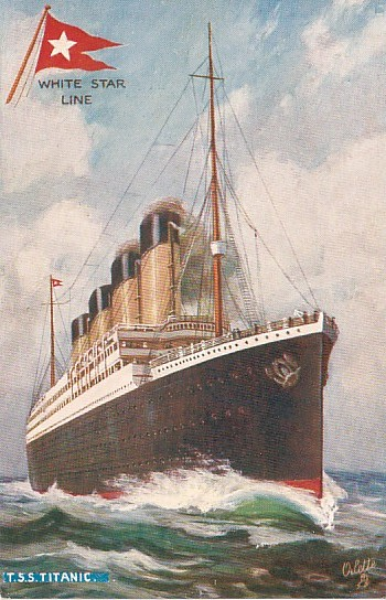 Titanic in postcard